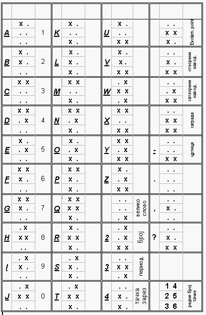 Брајова азбука